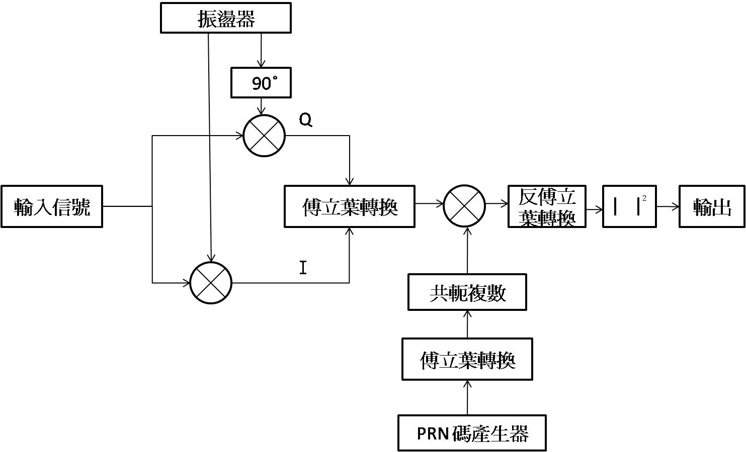 中文（台灣）: 平行碼相位搜尋流程圖